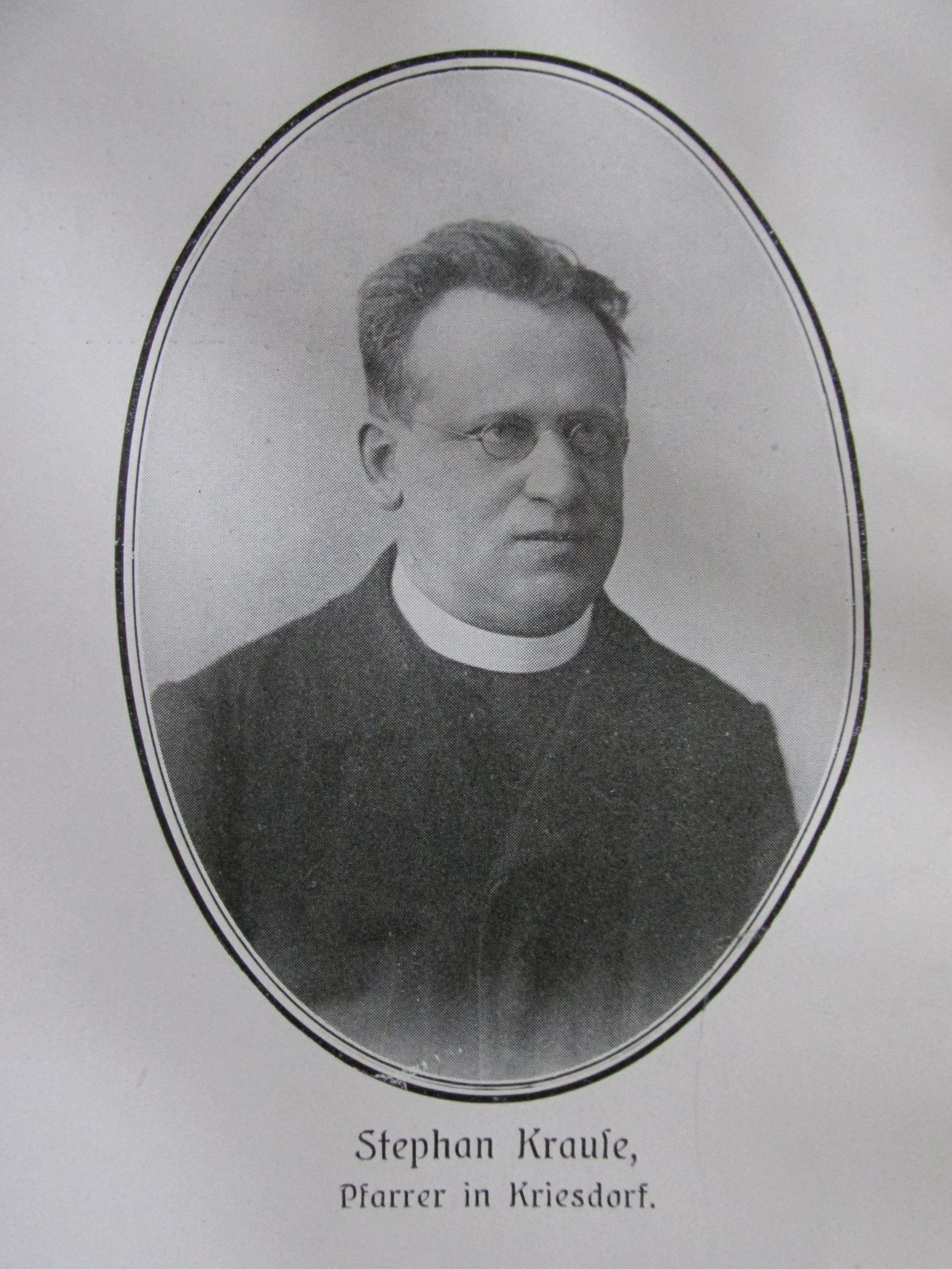 P. Stephan Florian Krauše; * 05. 04. 1857 Ludvíkov pod Smrkem, čp. 59; syn: Florian Krauše, syn Floriana Krauše a Wilmy roz. Müller; Franziska, dcera Josefa Hübnera a Magdaleny roz. Hübner; gymnaziální studia na Gymnáziu v Litoměřicích; filosoficko - teologické studia v Litoměřicích;ord. na kněze 20. 07. 1880; kaplan v Dětřichově u Frýdlantu; kaplan v Hrádku nad Nisou (Grottau); kaplan v Raspenavě; administrátor v Bílém Kostelci; administrátor v Raspenavě; administrátor v Bulovce; farář v Kryštofově Údolí (od 1889); farář v Křižanech (od 1903)